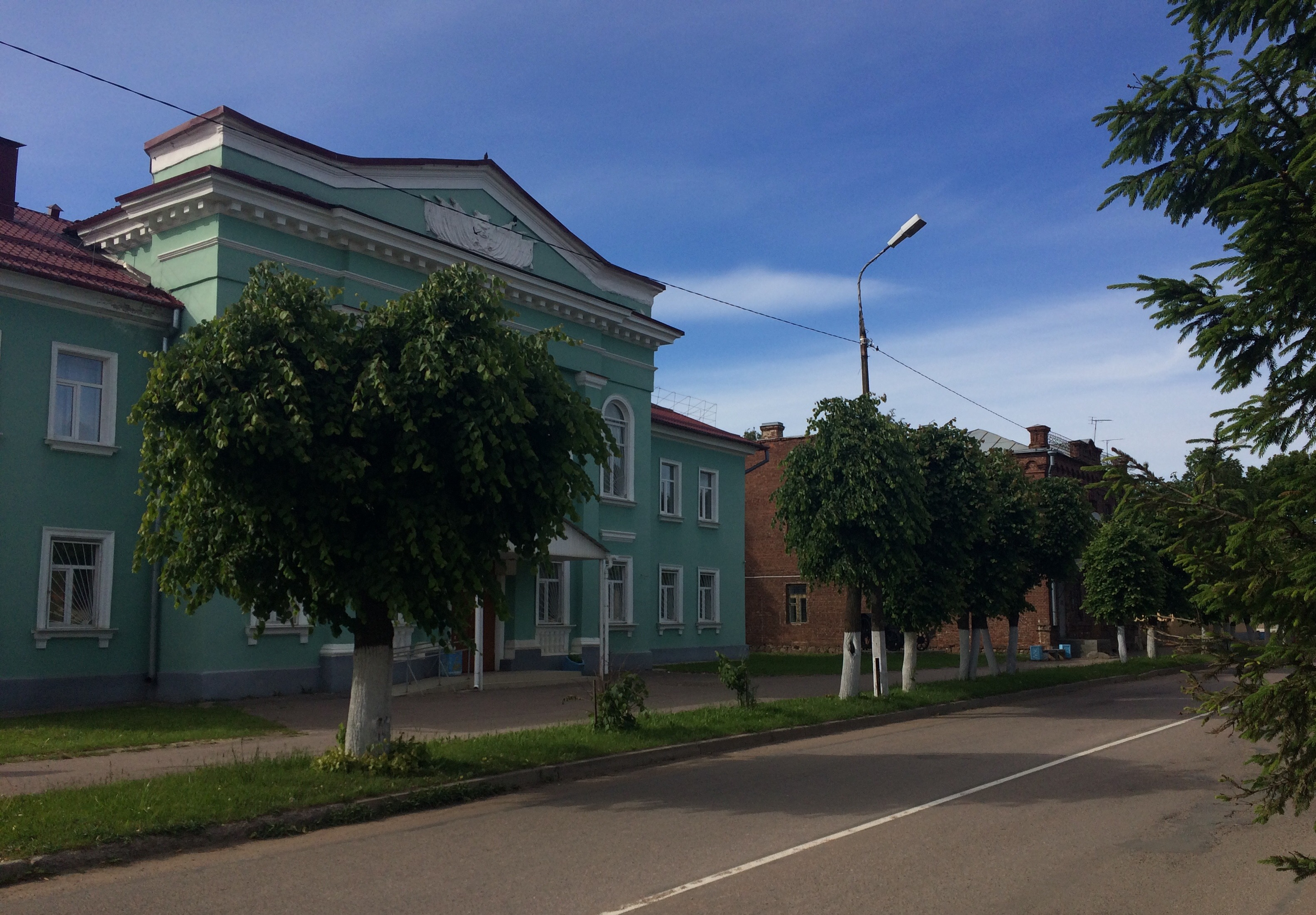 Улица Карла Маркса, Гдов.